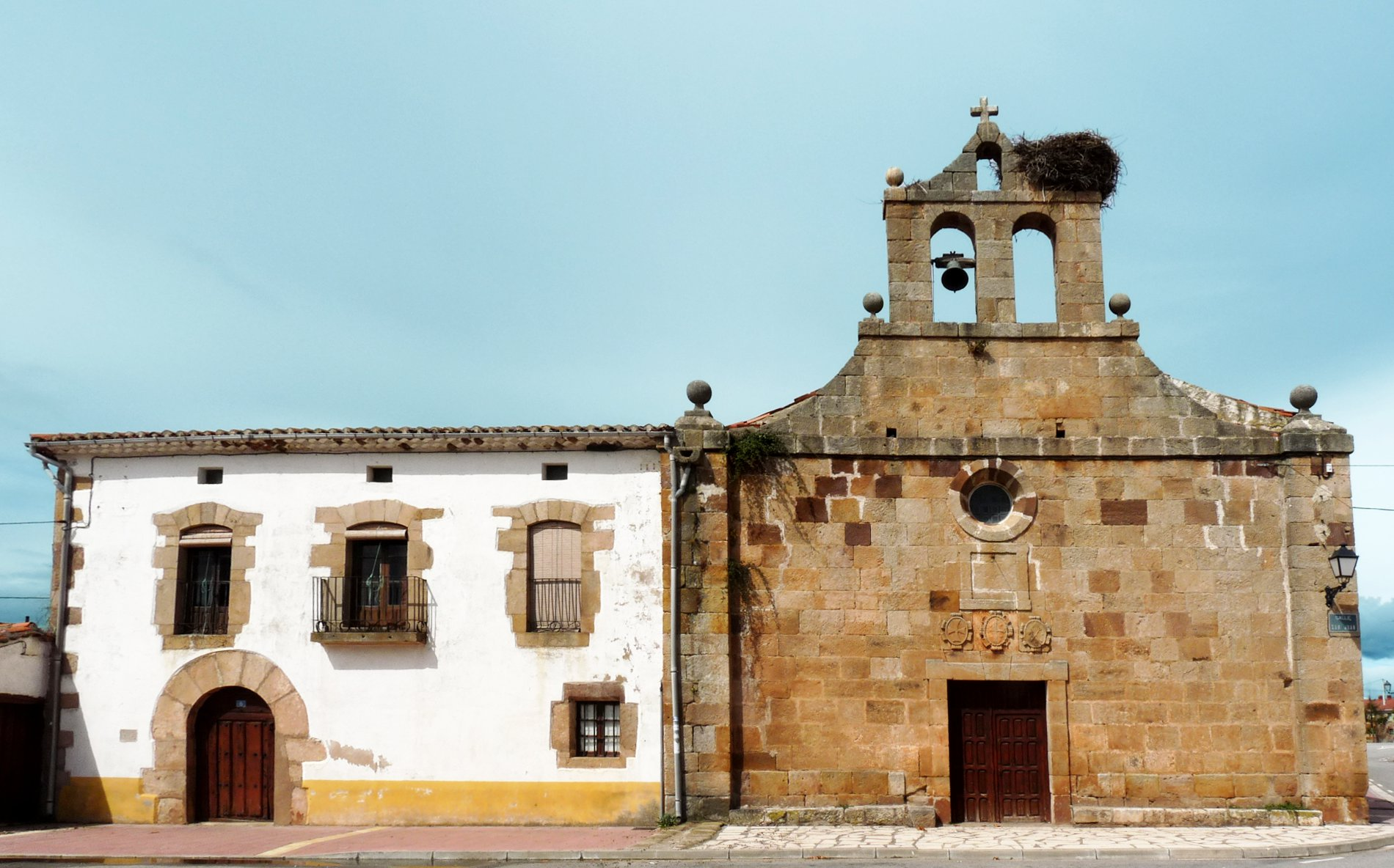 Barbadillo del Mercado - Iglesia de la Trinidad (1597) y casa convento.